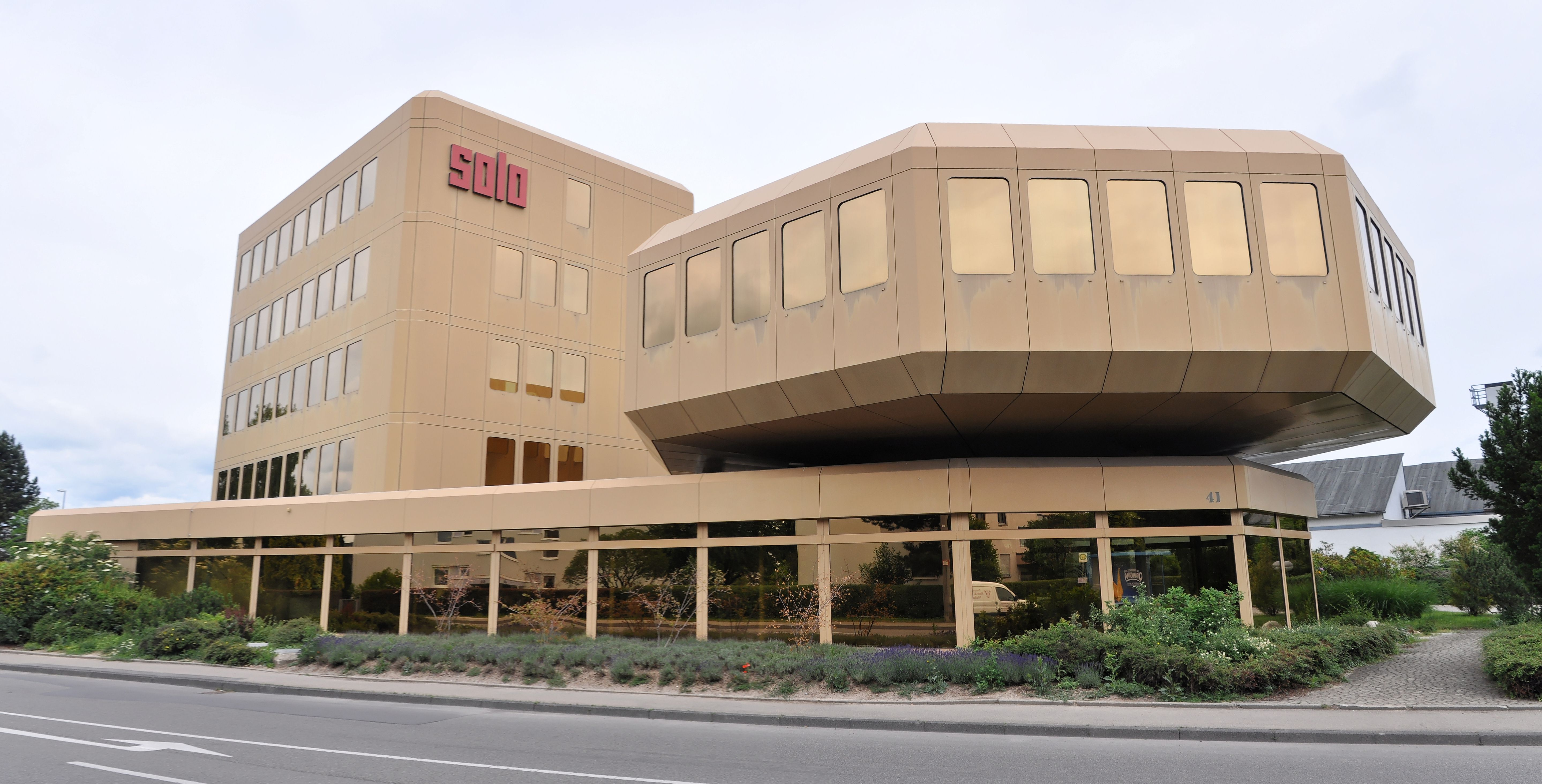 Das ehemalige Verwaltungsgebäude der Maschinenfabrik Solo in Sindelfingen